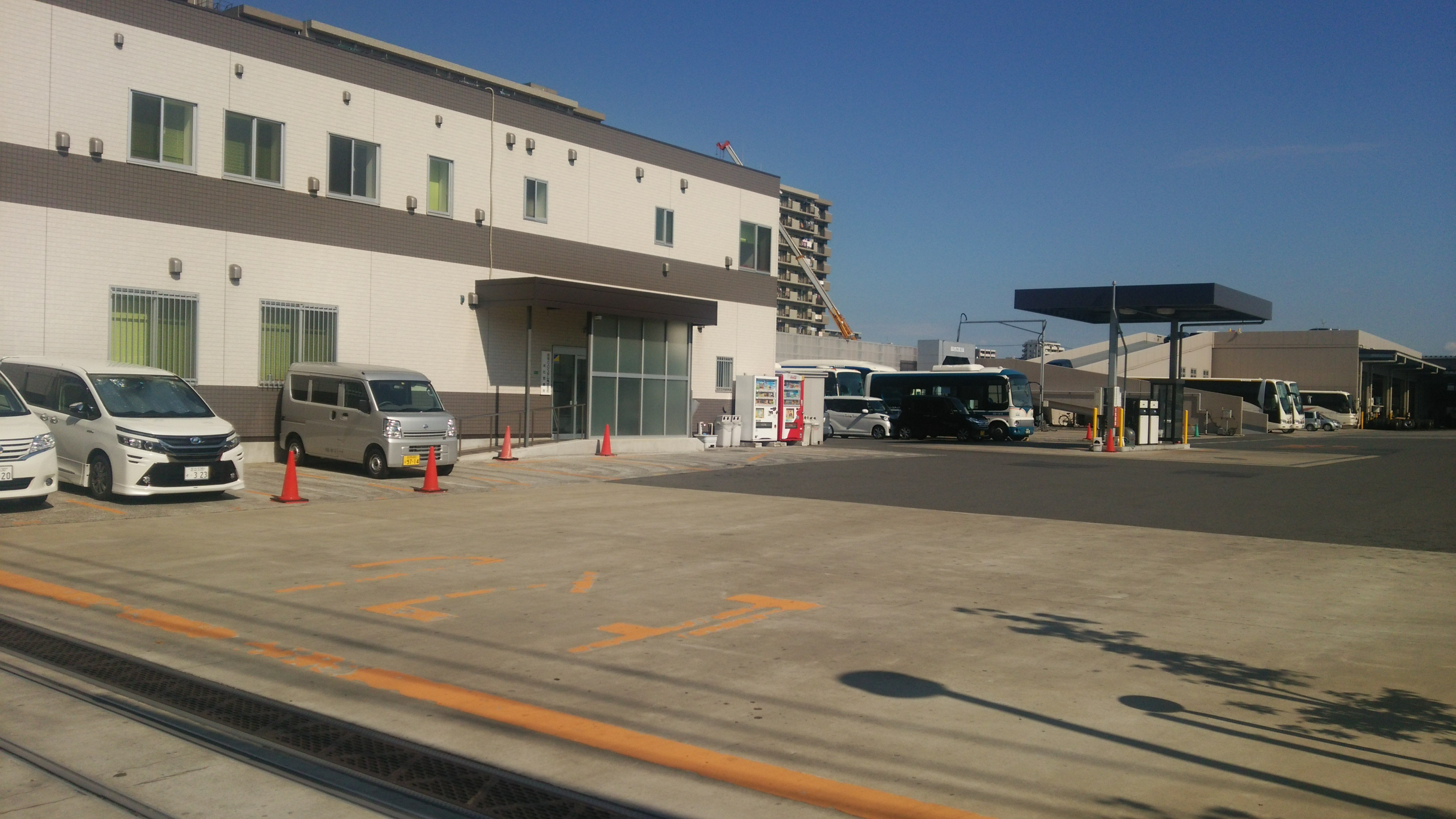 京成バスシステム本社屋（千葉県船橋市栄町1丁目10番）